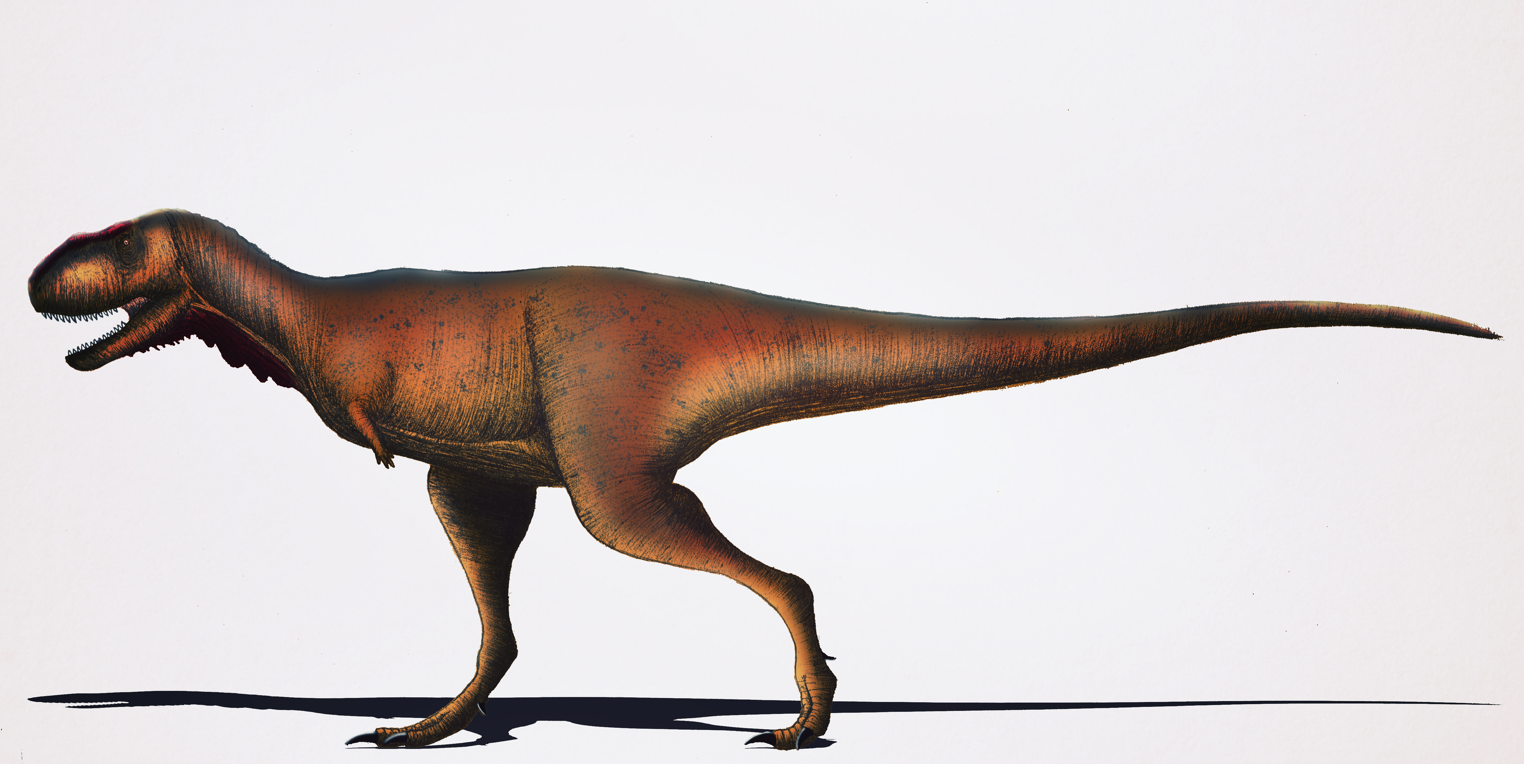 Ricostruzione di Rugops primus